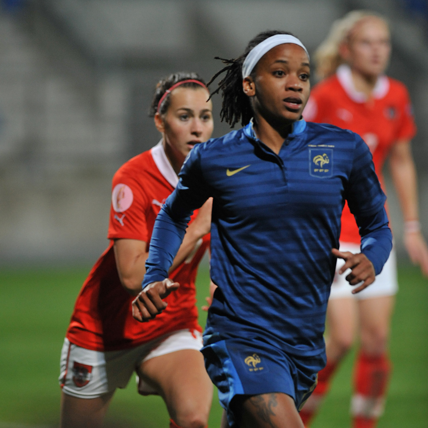 FIFA Women's World Cup 2015 Qualiying Round Österreich - Frankreich am 31. Oktober 2013 in Ritzing: Élodie Thomis